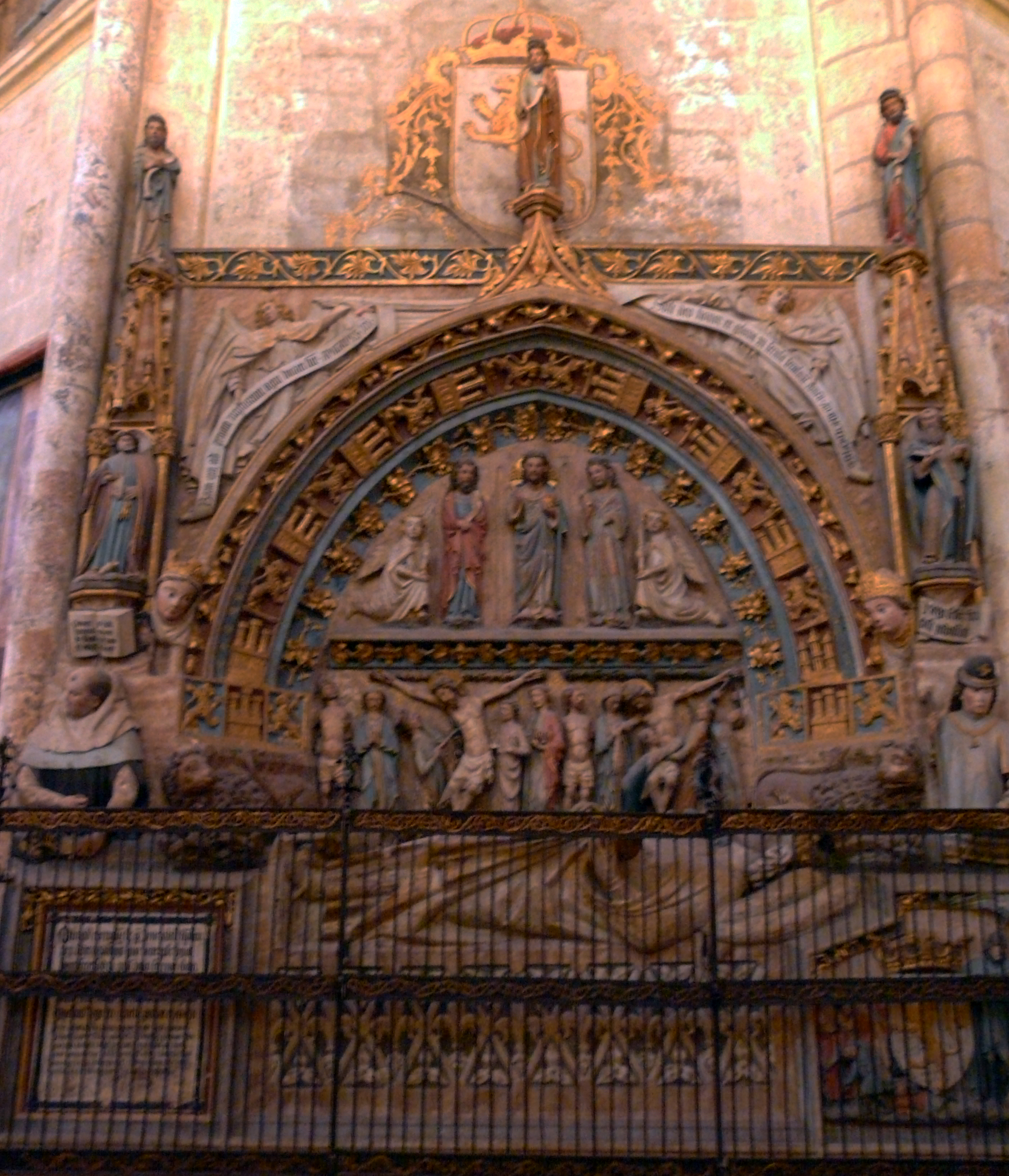 Sepulcro de Ordoño II de León. Se encuentra en la girola de la catedral de León, (España).